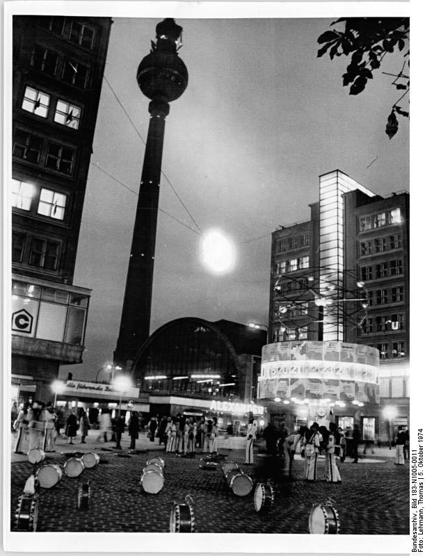 Berlin, Alexanderplatz, Fernsehturm, Weltzeituhr, Nacht ADN-ZB Lehmann 5.10.74-str-Berlin: 25.Jahrestag-Lichterschmuck, wie hier am Alexanderplatz, hat die DDR-Hauptstadt am Vorabend des großen Feiertages angelegt.